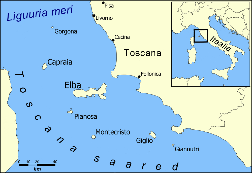 Toscana saarte kaart